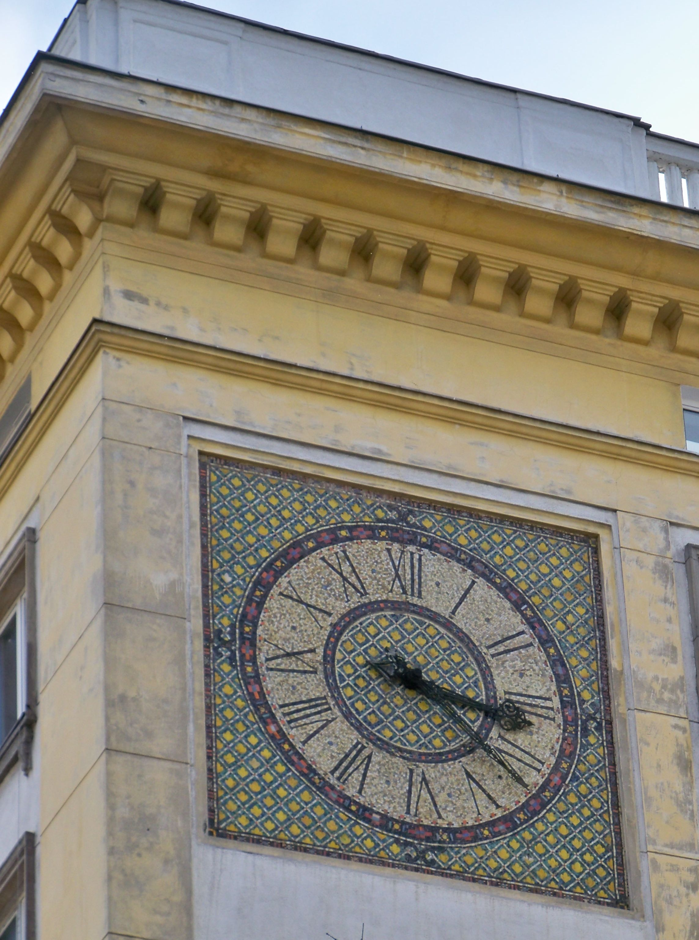 Mozaikowy zegar na bloku przy Marszałkowskiej 55/73 (róg Wilczej). Autor: Hanna Główczewska